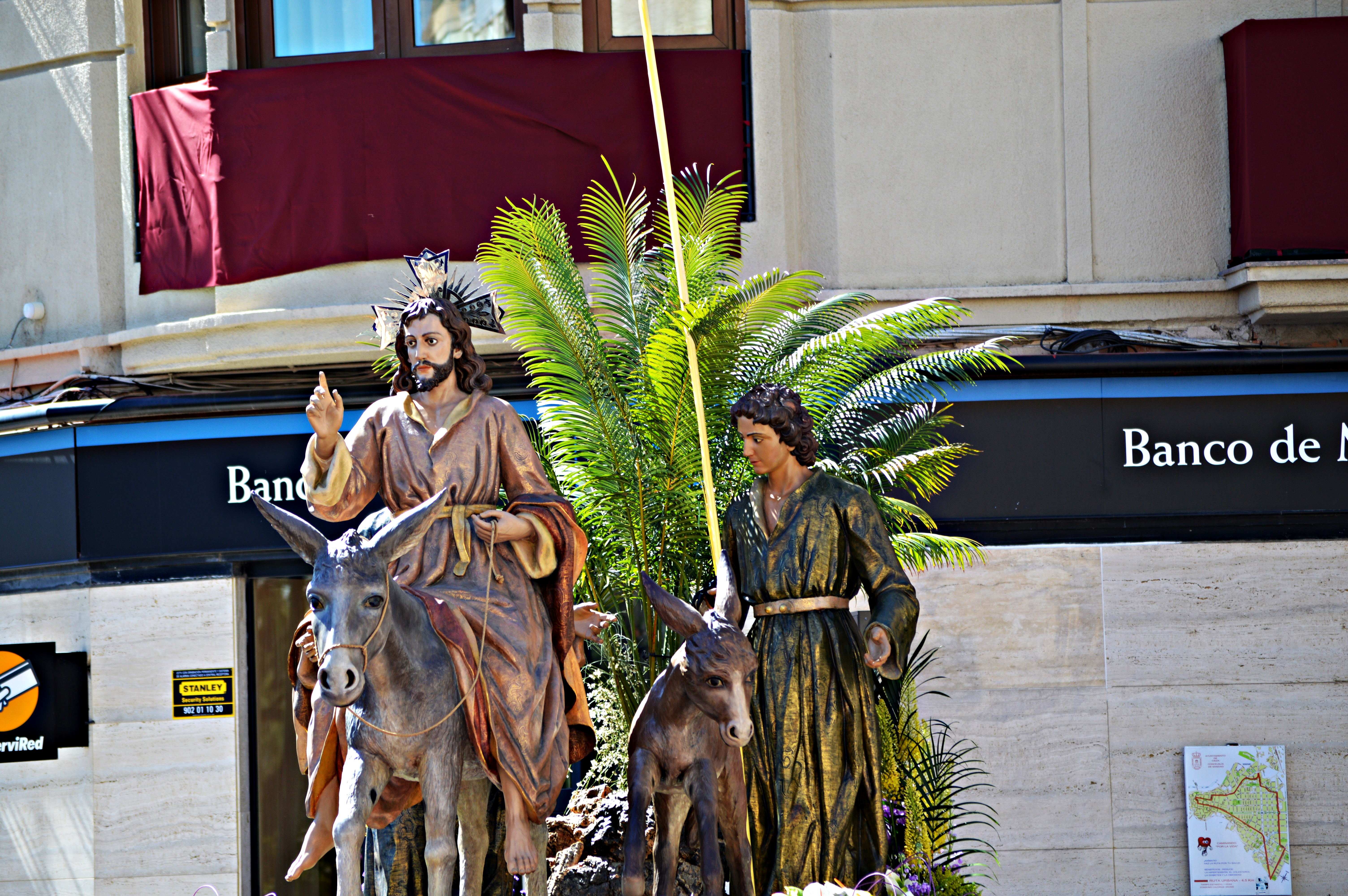 Paso de la Entrada de Jesús en Jerusalén de Cieza (Murcia), obra del ciezano Manuel Juan Carrillo Marco.